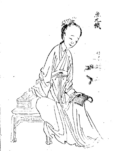 歷朝名媛詩詞﹕十二卷(清陸昶輯)。清乾隆三十八年（1772）紅樹樓刻本 魚玄機